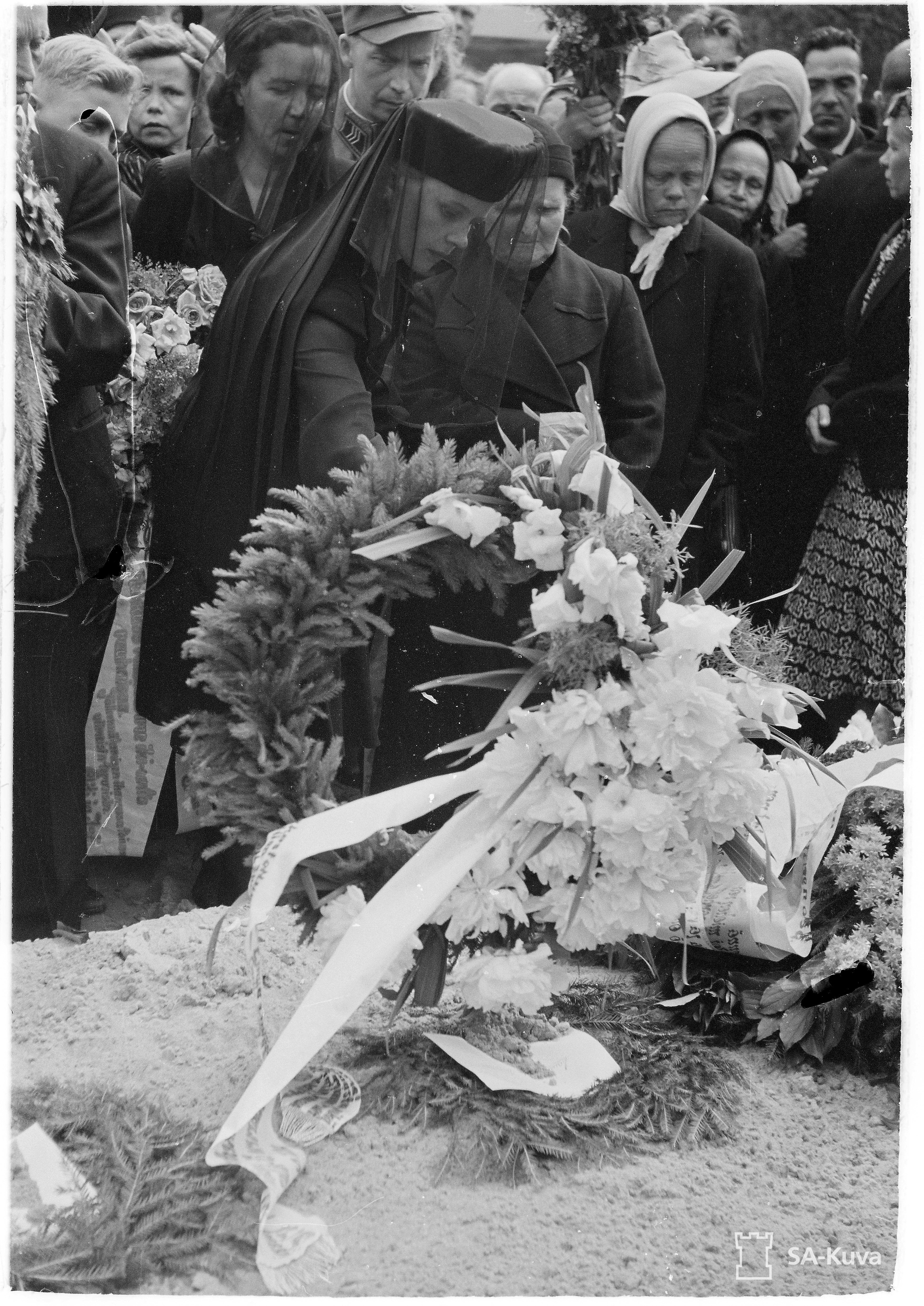 Mannerheim-ristin ritari Lauri Nissisen hautajaistilaisuus. Rouva Nissinen laskee seppeleensä 13.7.1944.